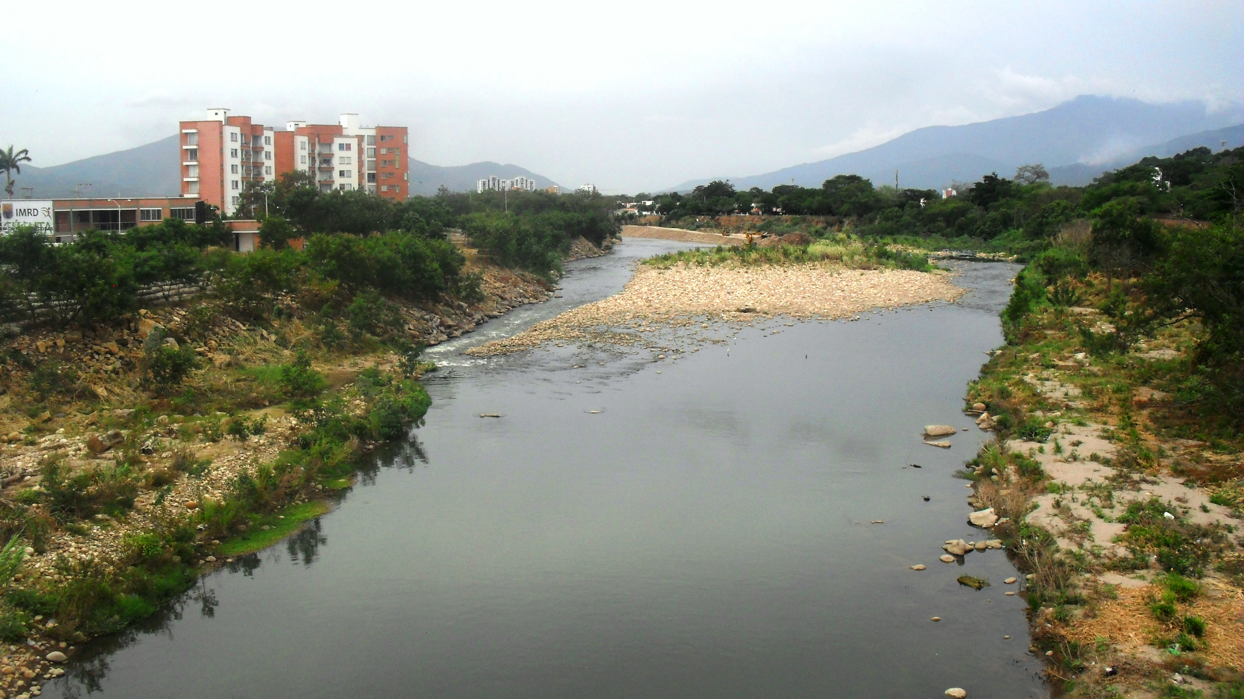 El río Pamplonita desde el puete Jorge Gaitan Durán,Cúcuta.